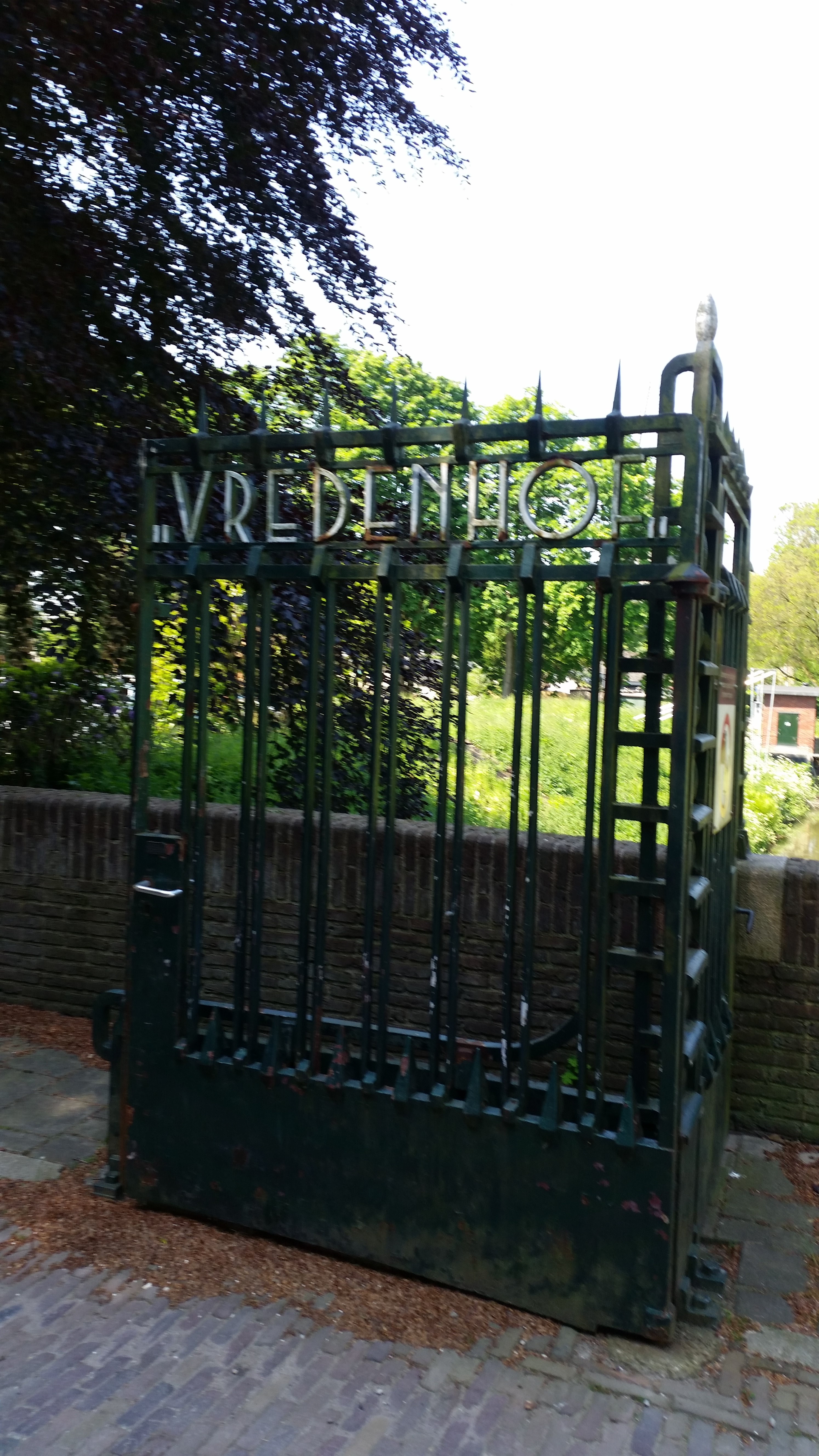 Begraafplaats Vredenhof, toegangshek , Haarlemmerweg, Amsterdam